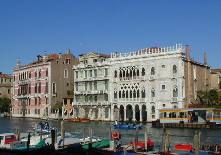 Ca' D'Oro La foto è stata scattata il 2 novembre 2001 a Venezia (Italia)